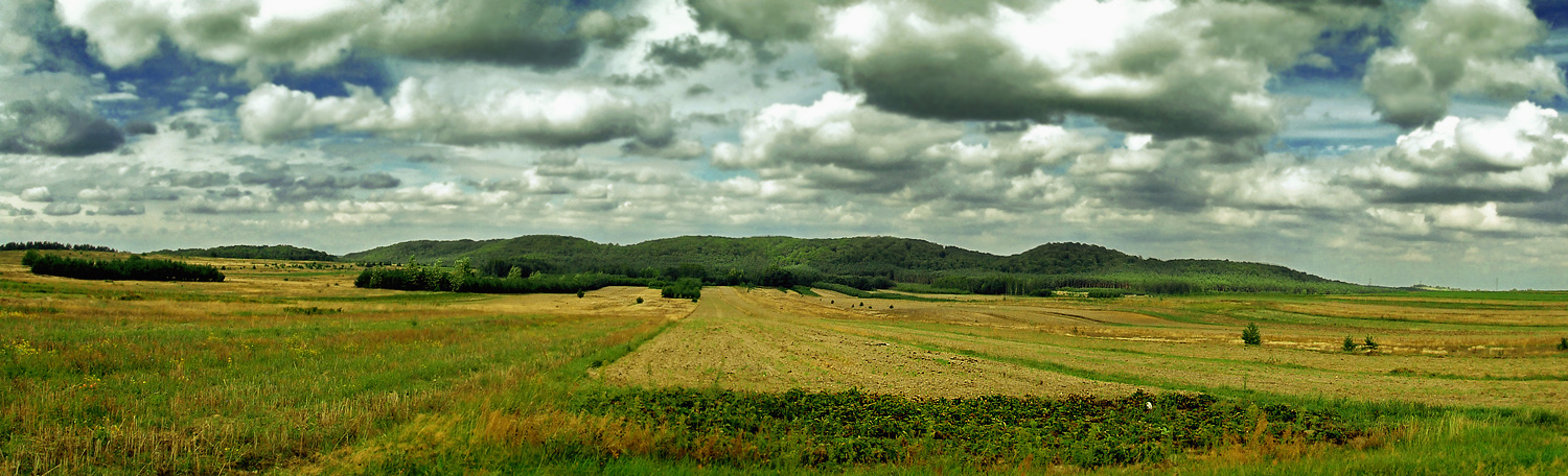 Sokole Góry - widok z miejscowości Biskupice